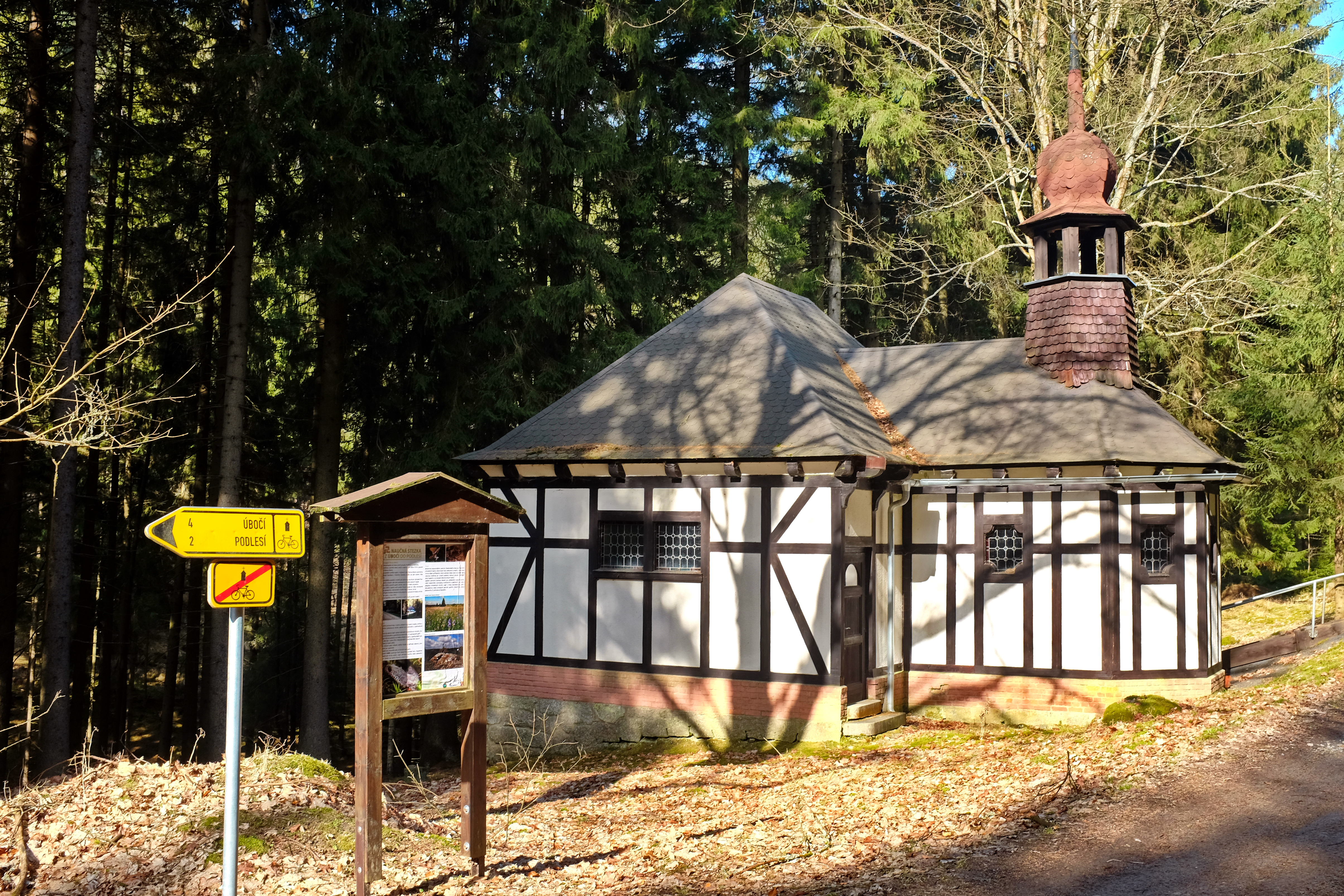 Kaple Panny Marie, lesní cesta s modrým turistickým značením, severozápadní úbočí Kamenné hory, severovýchodně od Podlesí, st. 51, Podlesí (Dolní Žandov).